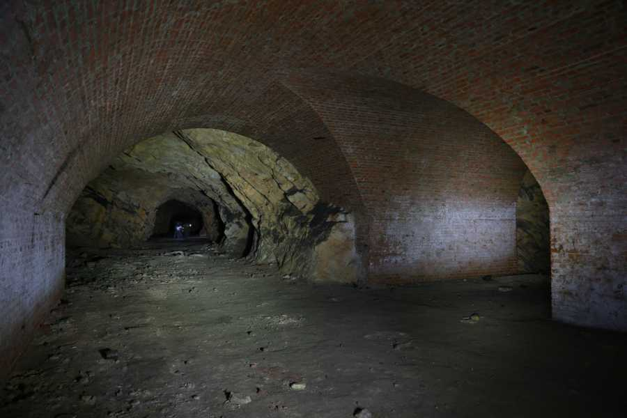 Ab Herbst 1943 wurde durch die Organisation Todt mit der Auffahrung der Großstollenanlage „Saphir“ begonnen. Geplant war dir unterirdische Produktion von Flugmotoren durch die Kasseler Firma Henschel bzw. deren Tochterfirma Henschel Flugmotorenbau GmbH Altenbeuna. Unter Anleitung bergmännischer Fachkräfte der Bergwerksgesellschaft Hibernia trieben osteuropäische Zwangsarbeiter die Stollen in den Hardtkopf bei Elbenberg.